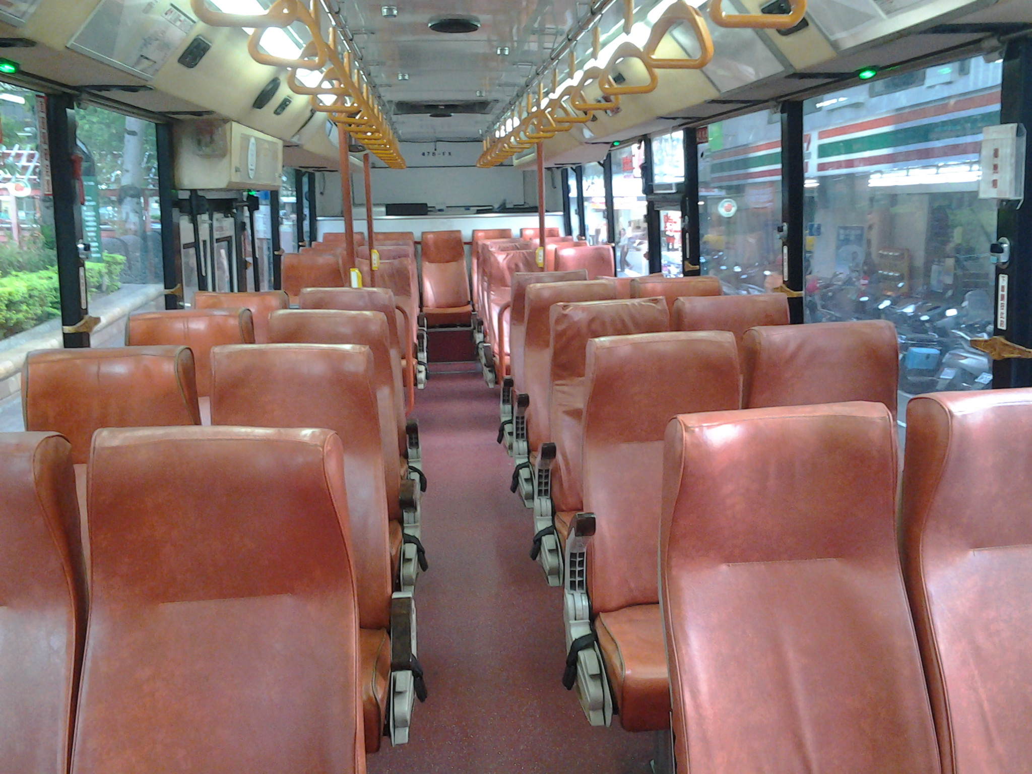 2005〈2012〉 HINO ERK2JRL（固特）(466-FX、478-FX)